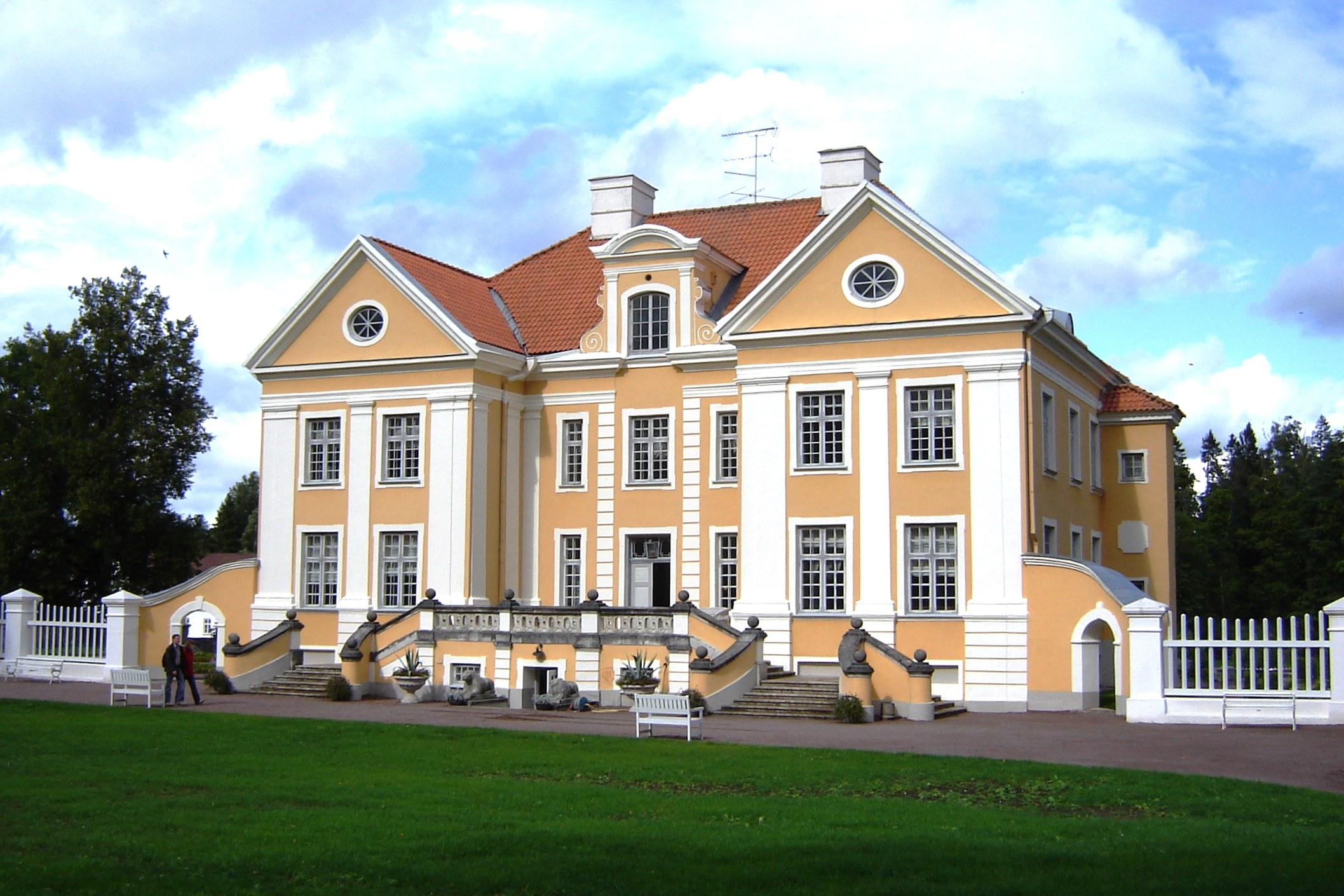 Guthaus Palmse (Estland)